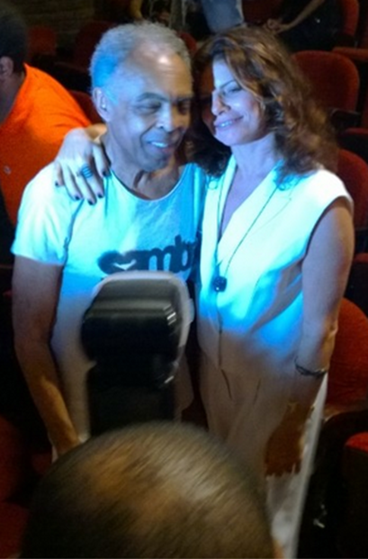 O cantor e compositor Gilberto Gil e a atriz Debora Bloch, brasileiros